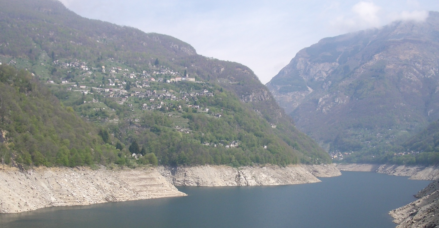 Mergoscia, Valle Verzasca, Switzerland self-made, May 2006